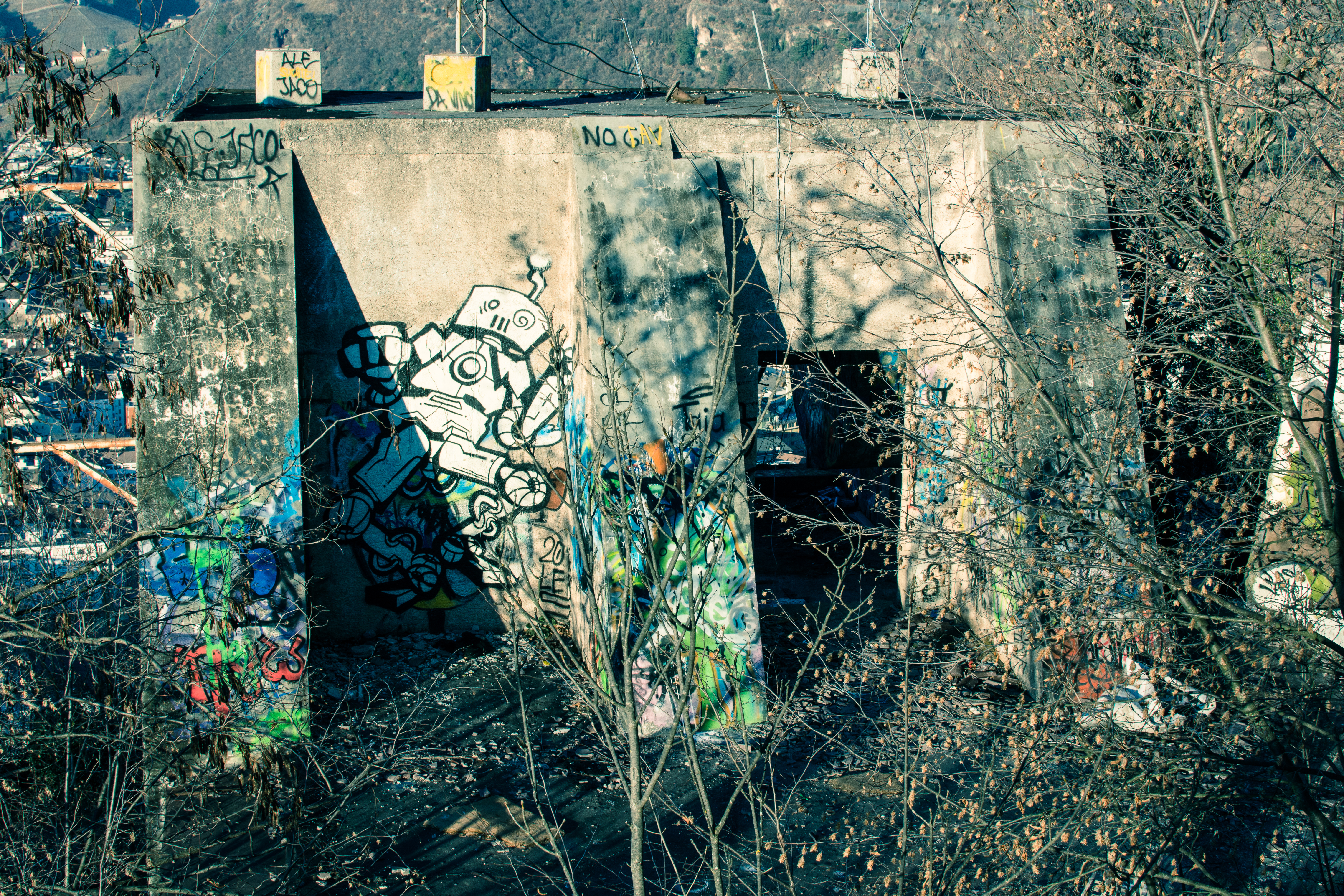 Überreste der Bergstation der Virgelbahn